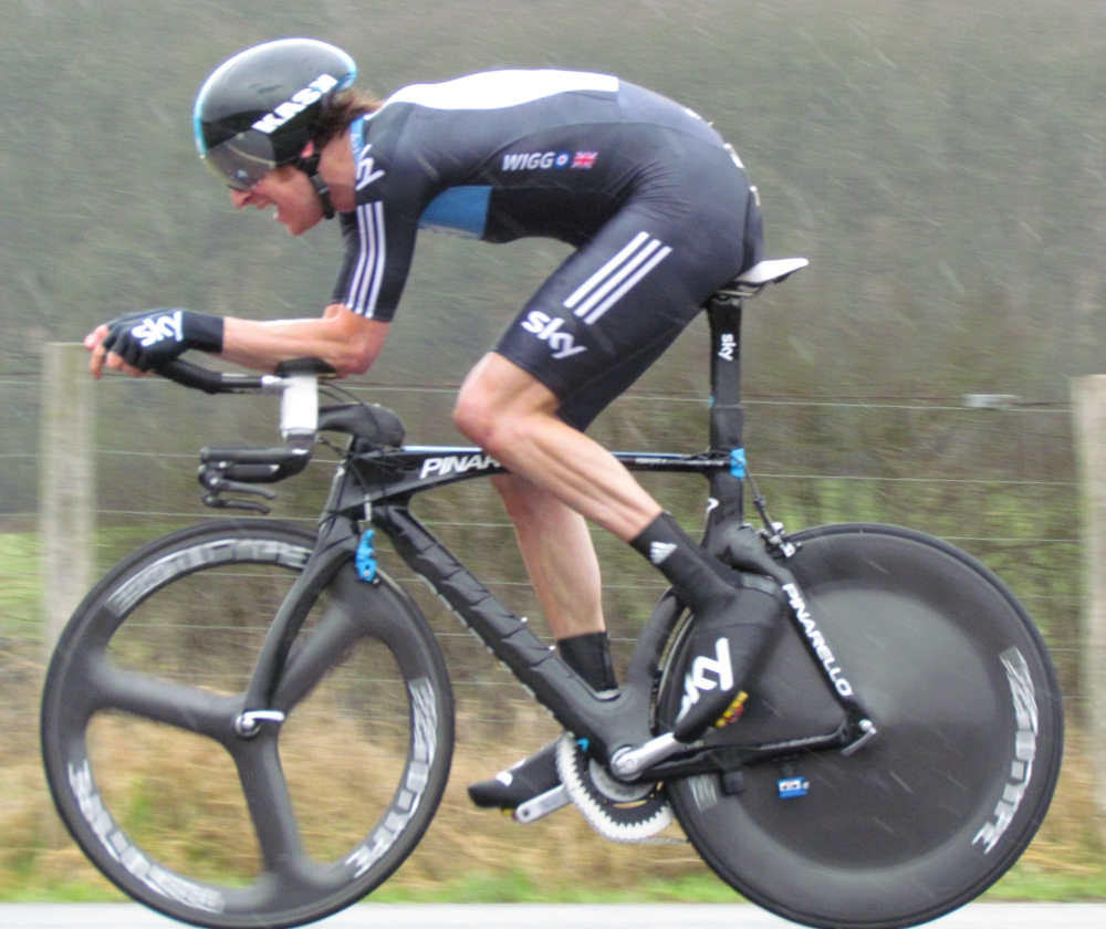 Wiggo paris nice 2012